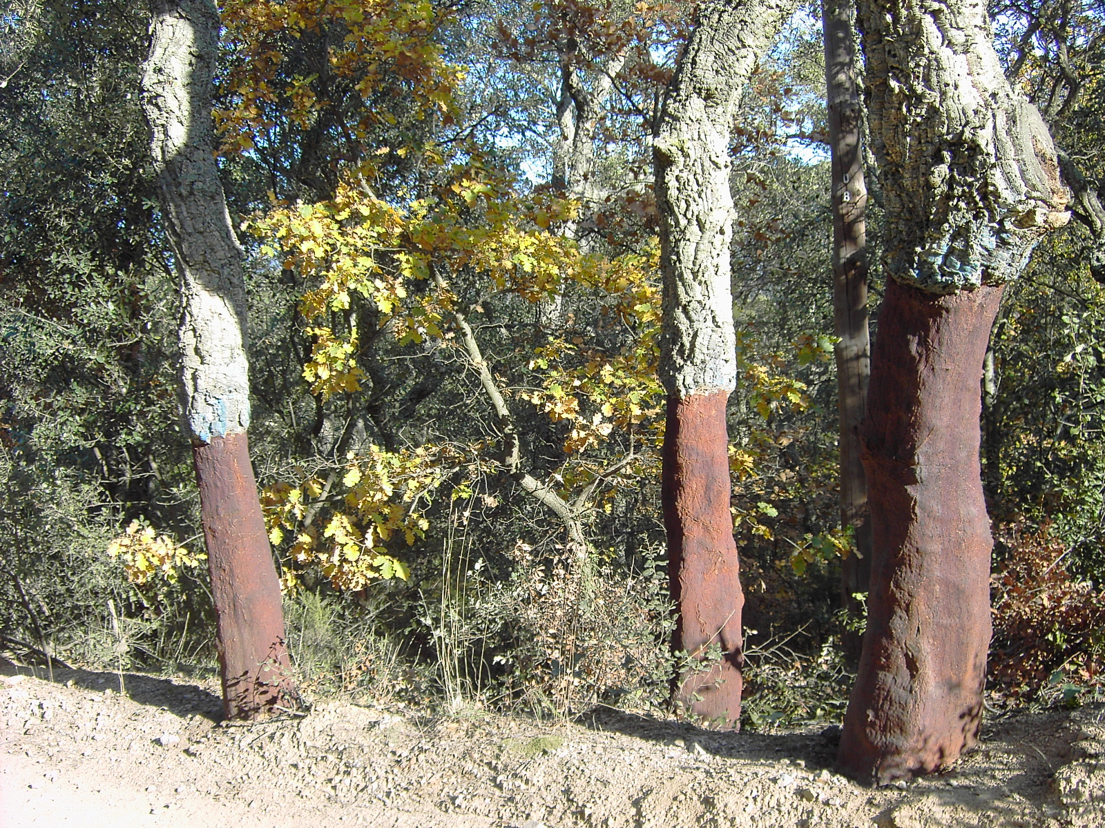 Tres alcornoques pelados en Agullana (Alto Ampurdán, Gerona).